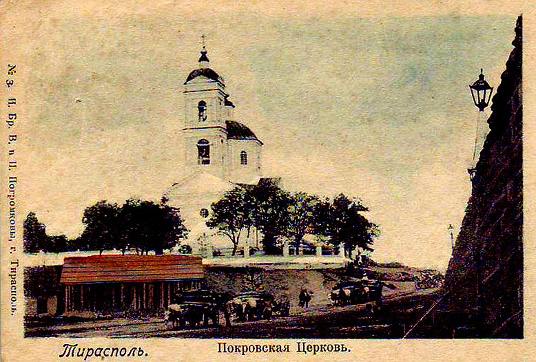 Cerkiew Opieki Matki Bożej w Tyraspolu zburzona w 1934